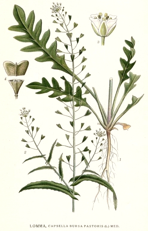 Original Description Lomma, Capsella bursa-pastoris (L.) Med.